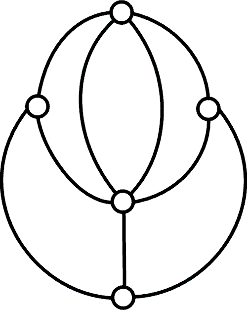 Multigrafo